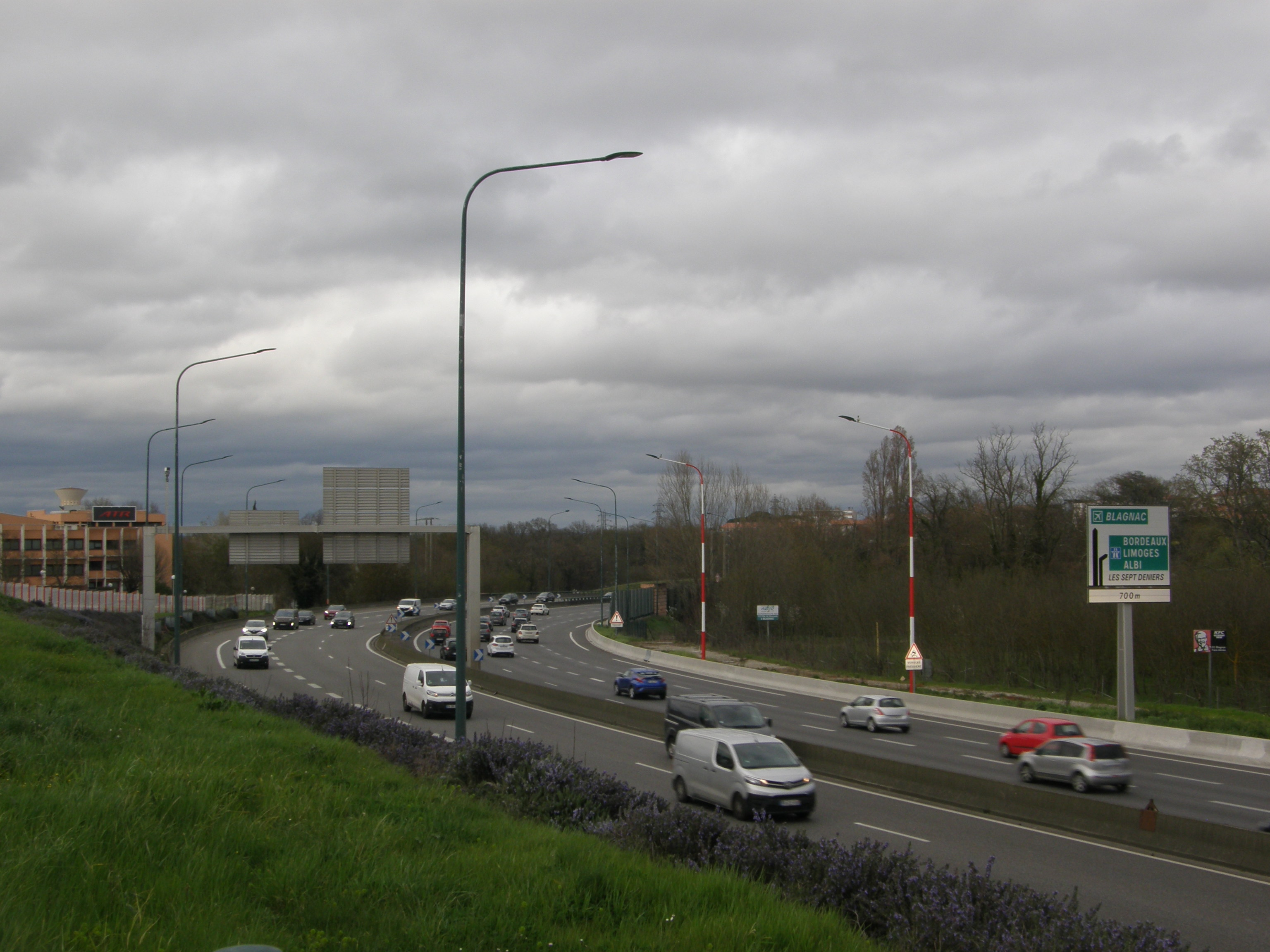 Le "Fil d'Ariane" (D901) reliant l'A624 à l'A621, vue depuis la Rue Velasquez.